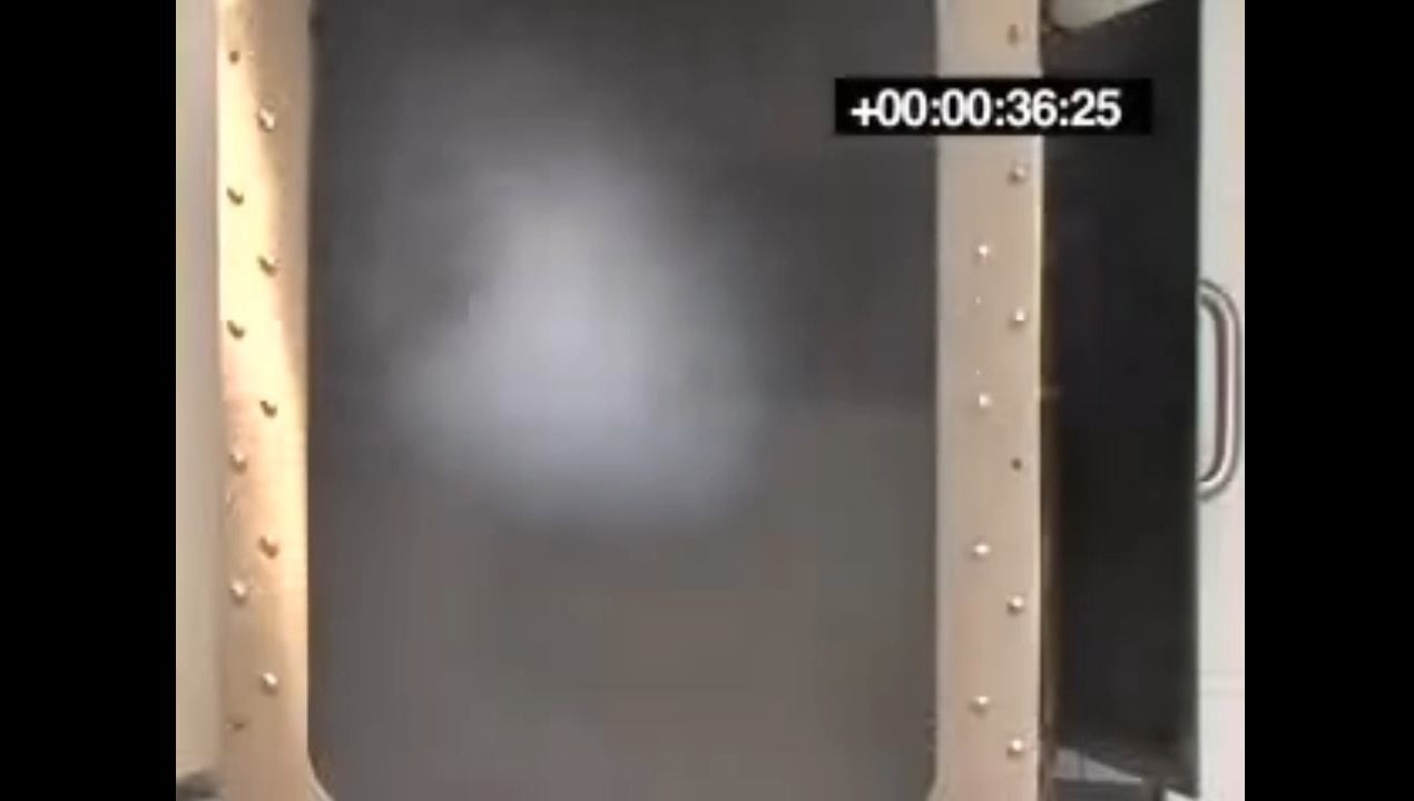 Small enclosure fire test